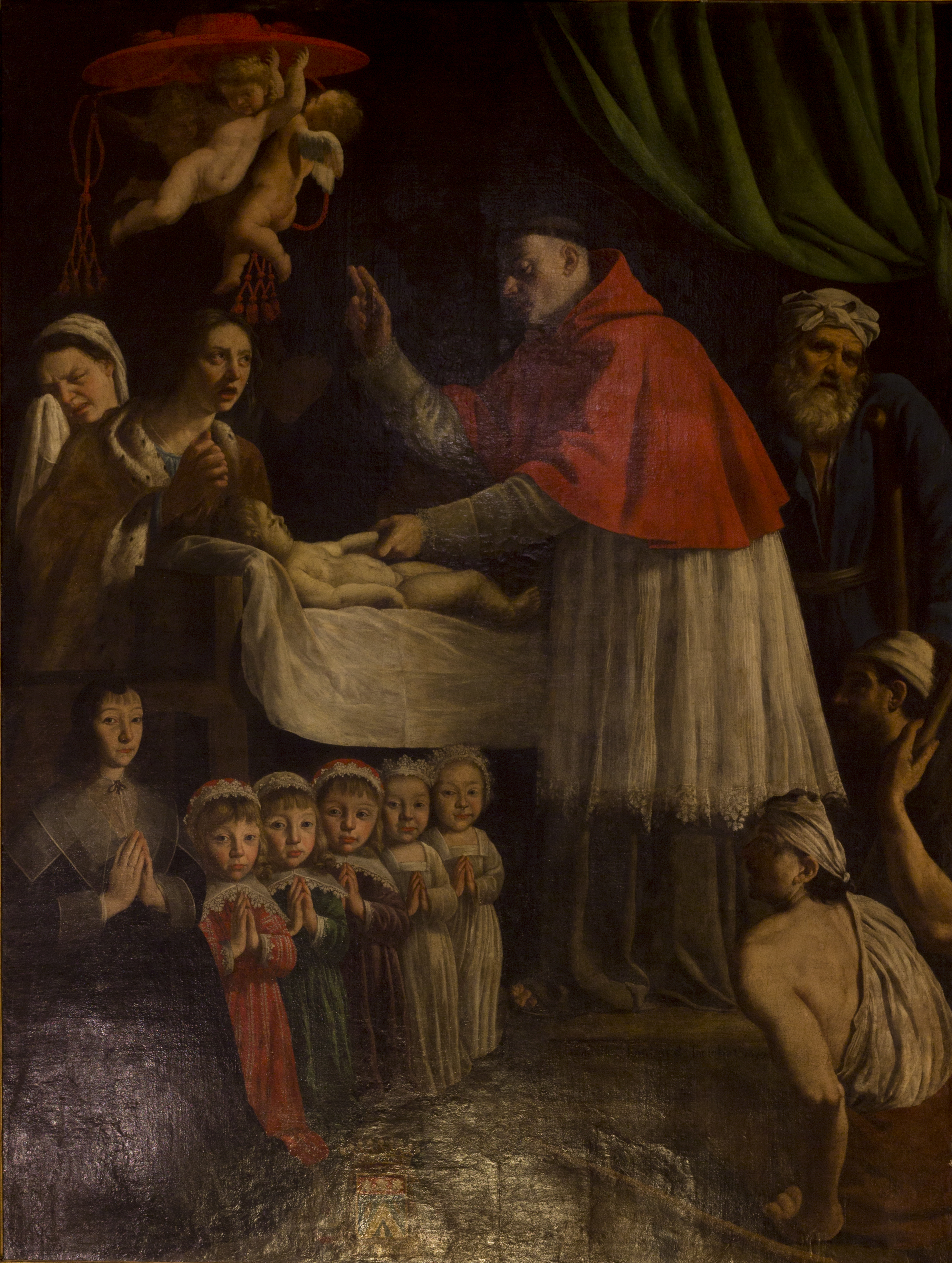 Le Miracle de saint Bonaventure, ex-voto peint par François Lombard pour la famille d’Anterroches. Œuvre conservée à l'église Saint-Bonaventure de Lyon.